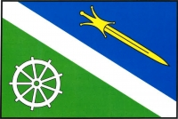 Bystřice (JC), vlajka. List dělený kosmým bílým pruhem širokým šestinu šířky listu na zelené žerďové a modré vlající pole. V zeleném poli bílé mlýnské kolo s devíti lopatkami, v modrém kosmo žlutý keltský meč hrotem k vlajícímu okraji listu. Poměr šířky k délce listu je 2 : 3.